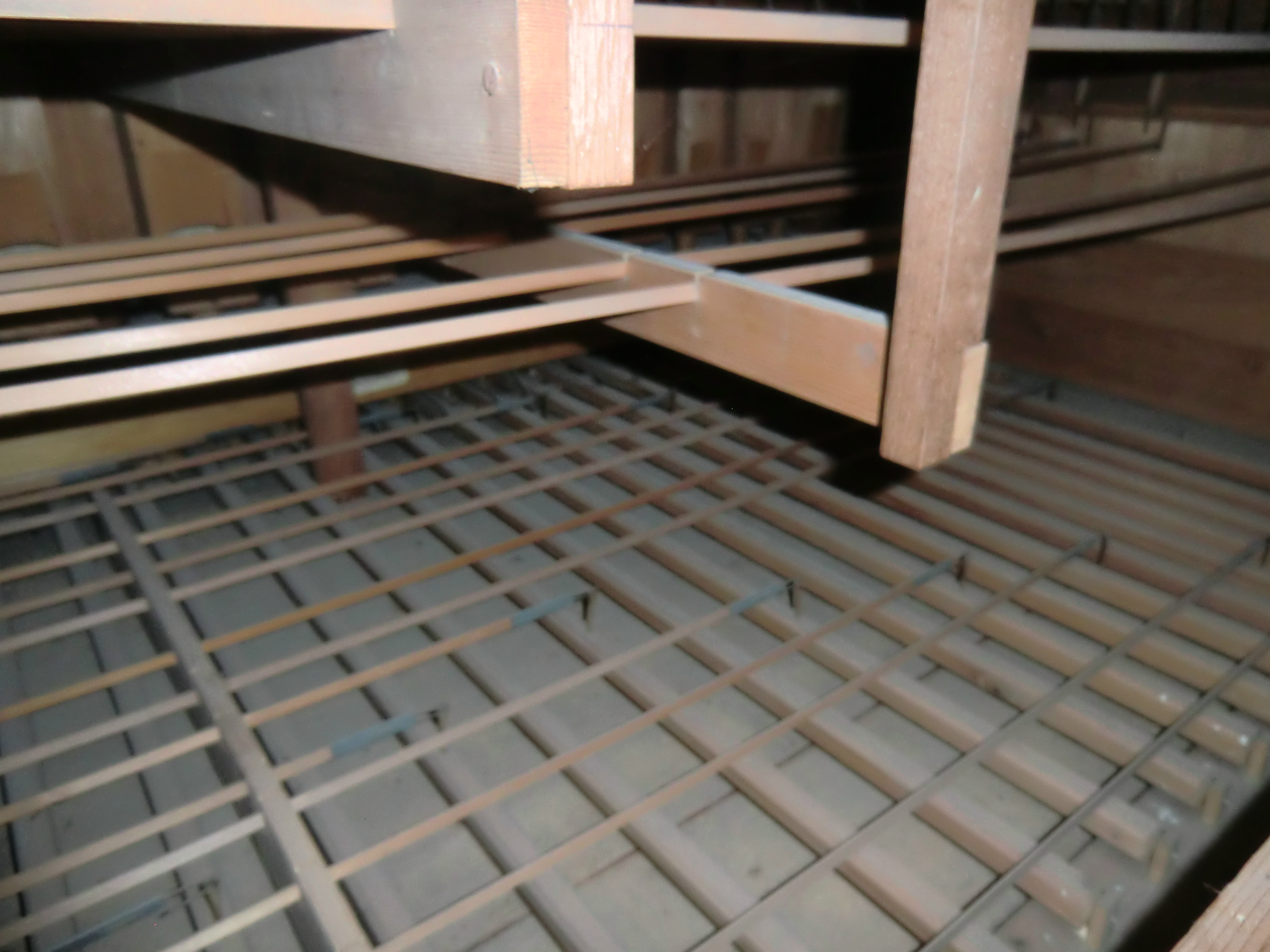 Horn-Orgel in Sauerthal (1903) - mechanische Kegelladentraktur